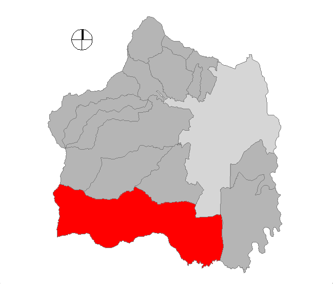 Corregimiento de Cali, Colombia